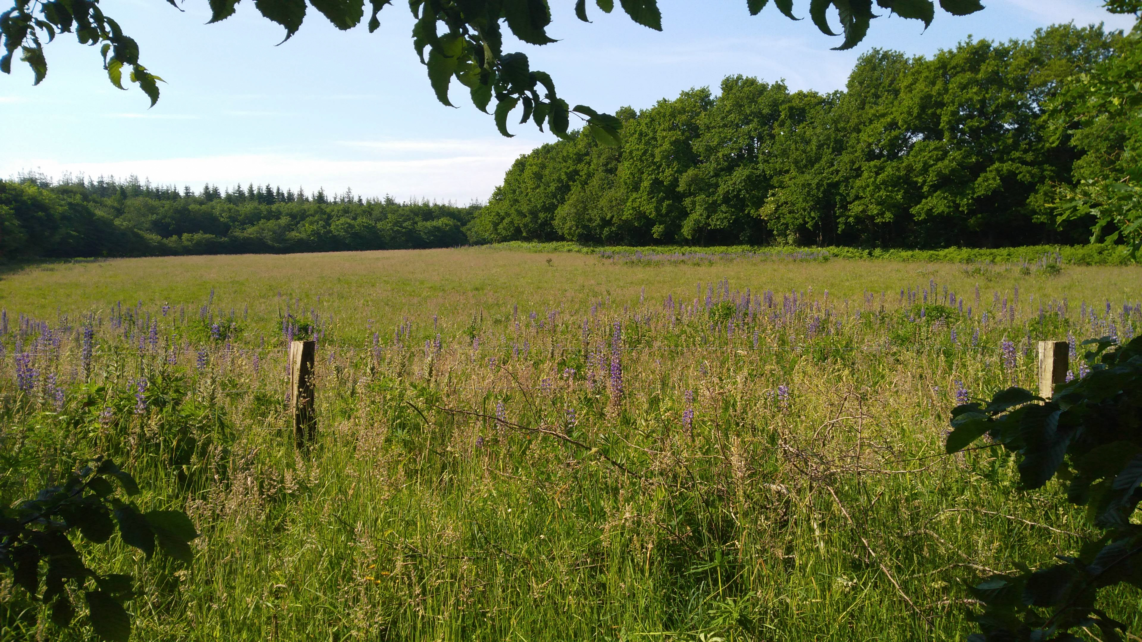 Extensiv beweidete Pferdekoppel (LRT 6510). Rechts Eichenwald (LRT 9190). Im Hintergrund Mischwald außerhalb des FFH-Gebietes